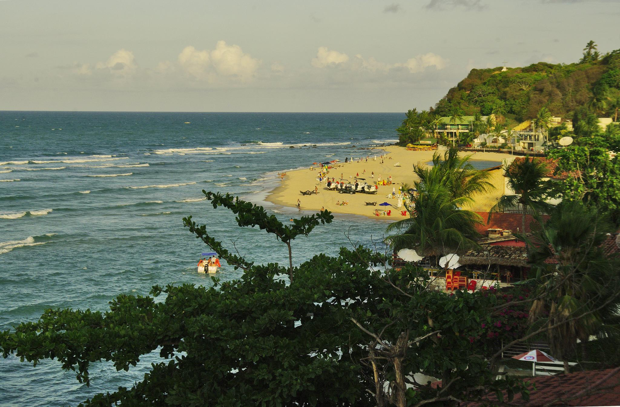 A Praia de Pipa, município de Tibau do SulTibau do Sul (RN.